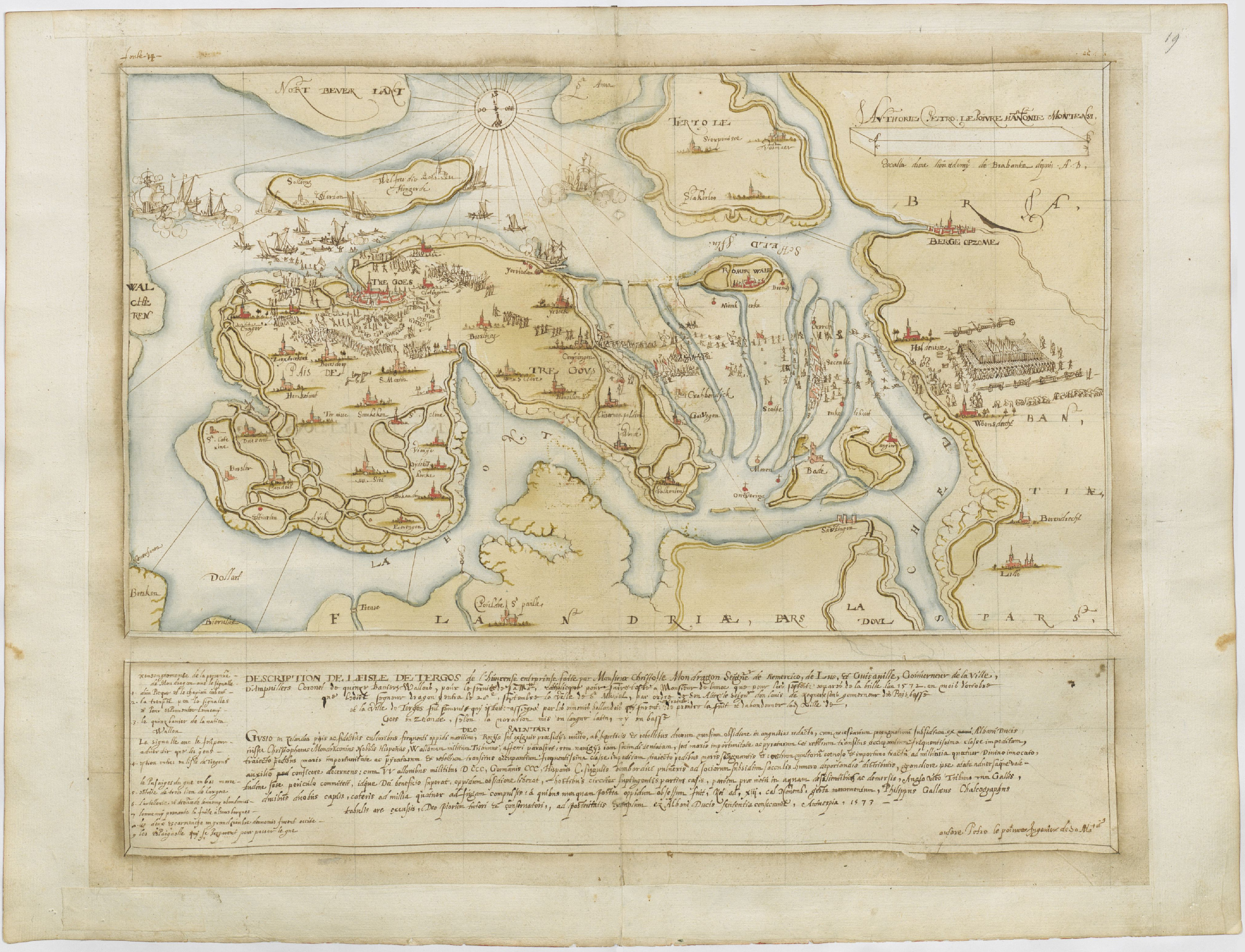 Beleg van Goes; Handschriftkaart